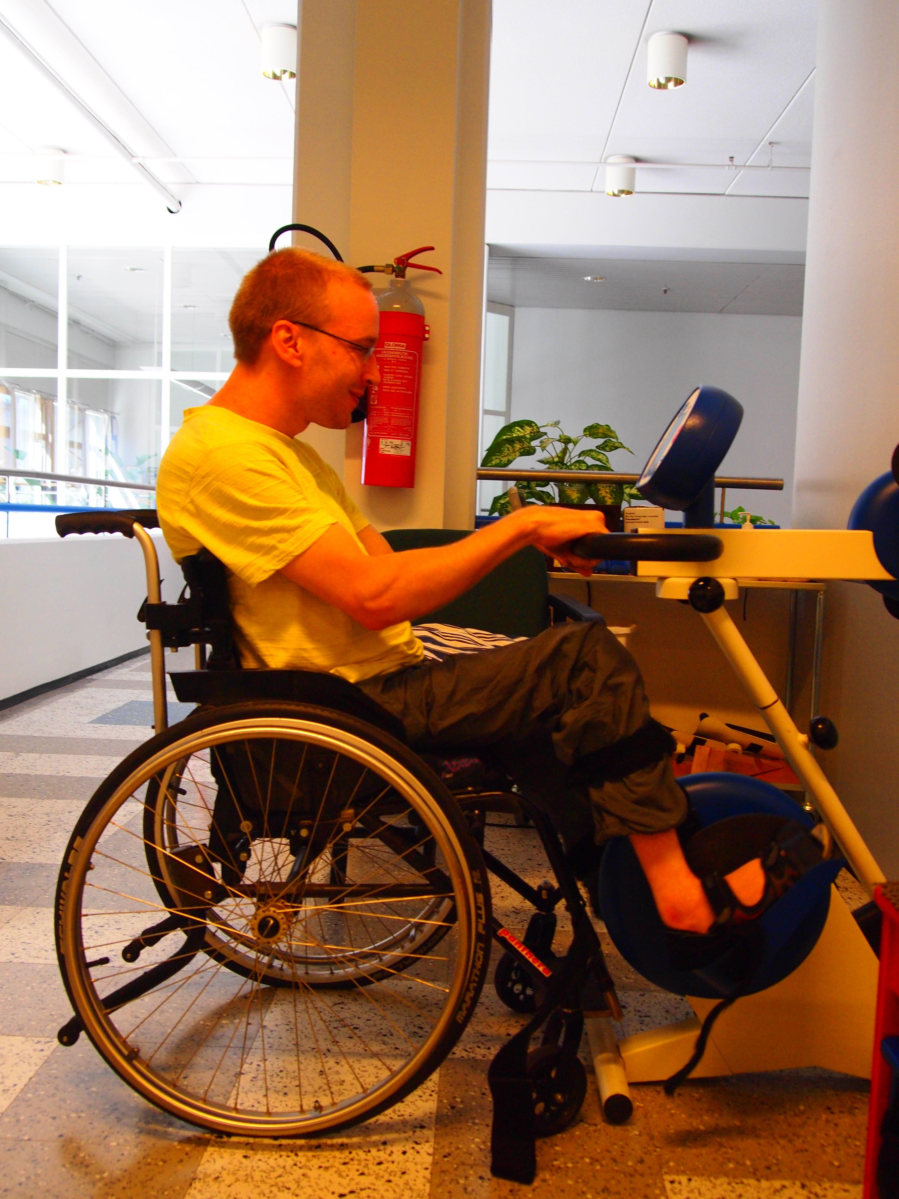 MOTOmed viva2 -liiketerapialaite